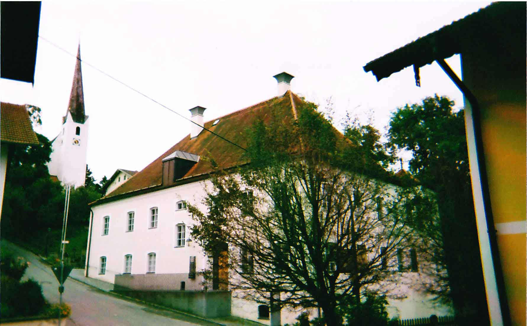 Pfarrkirche und Pfarrhof Oberdorfen von Westnordwest